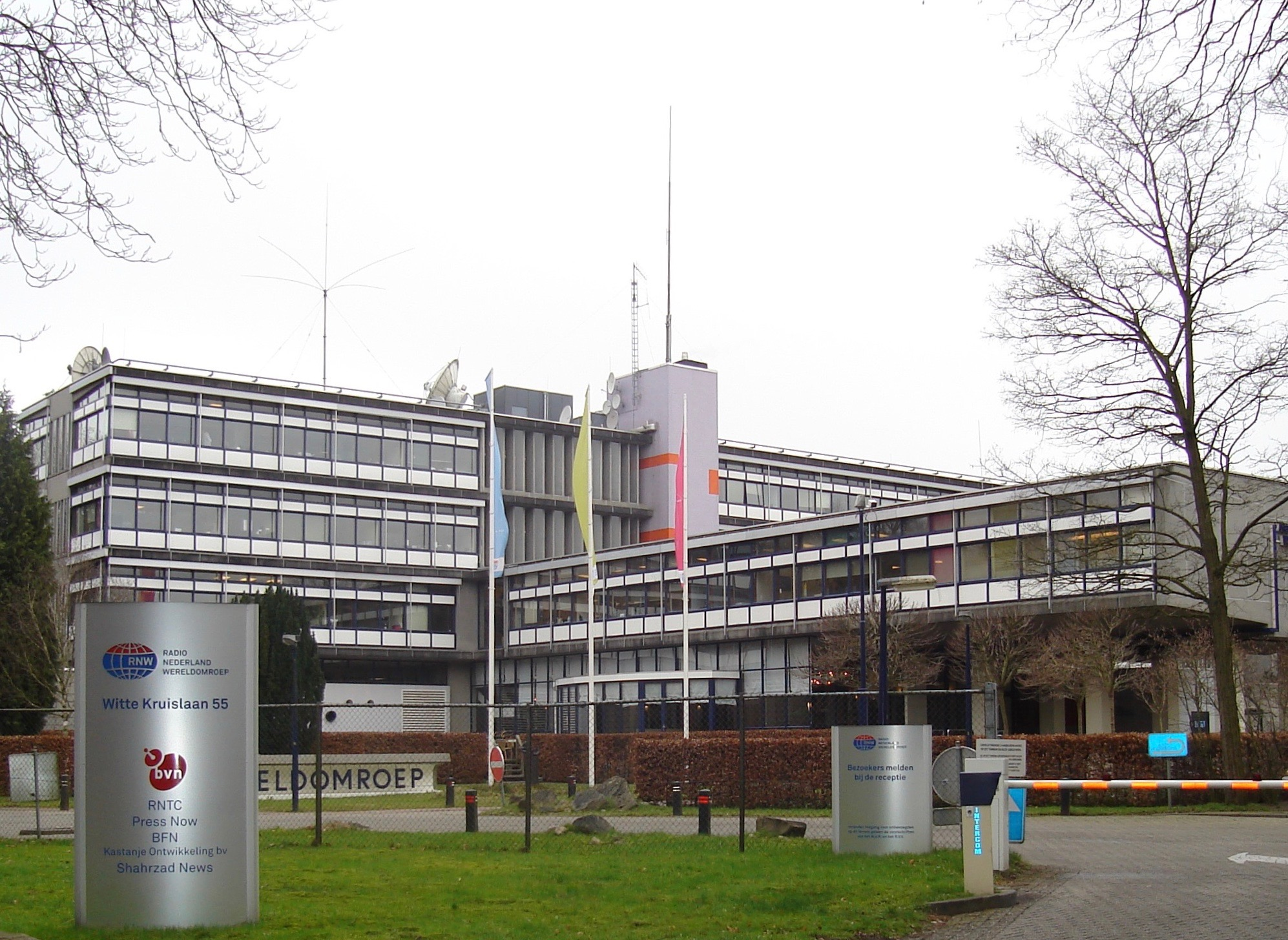 Radio Nederland Wereldomroep Gebouw مبنى إذاعة هولمندا العالمية